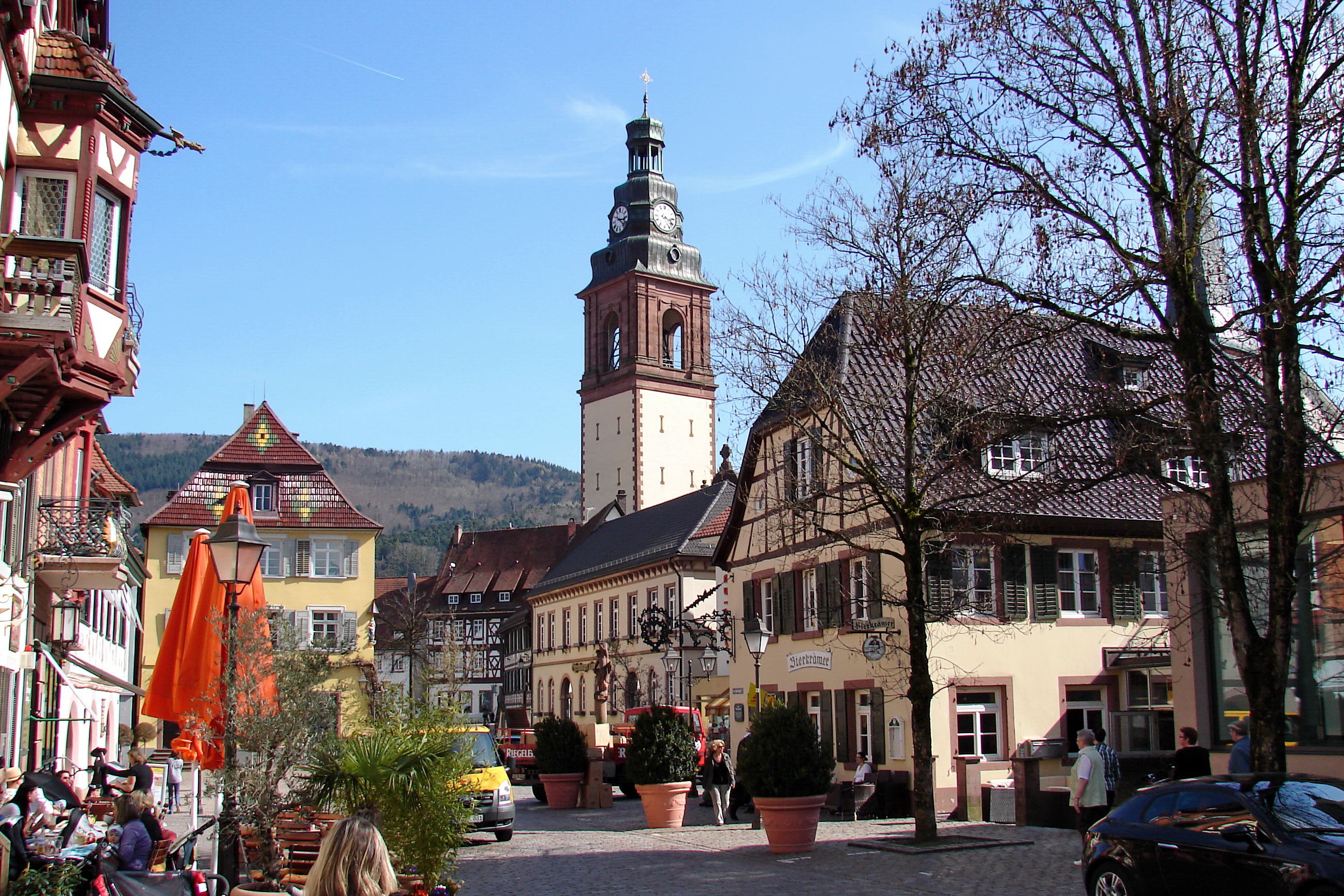 Haslach im Kinzigtal ist eine Kleinstadt mit knapp 7.000 Einwohnern im Schwarzwald.